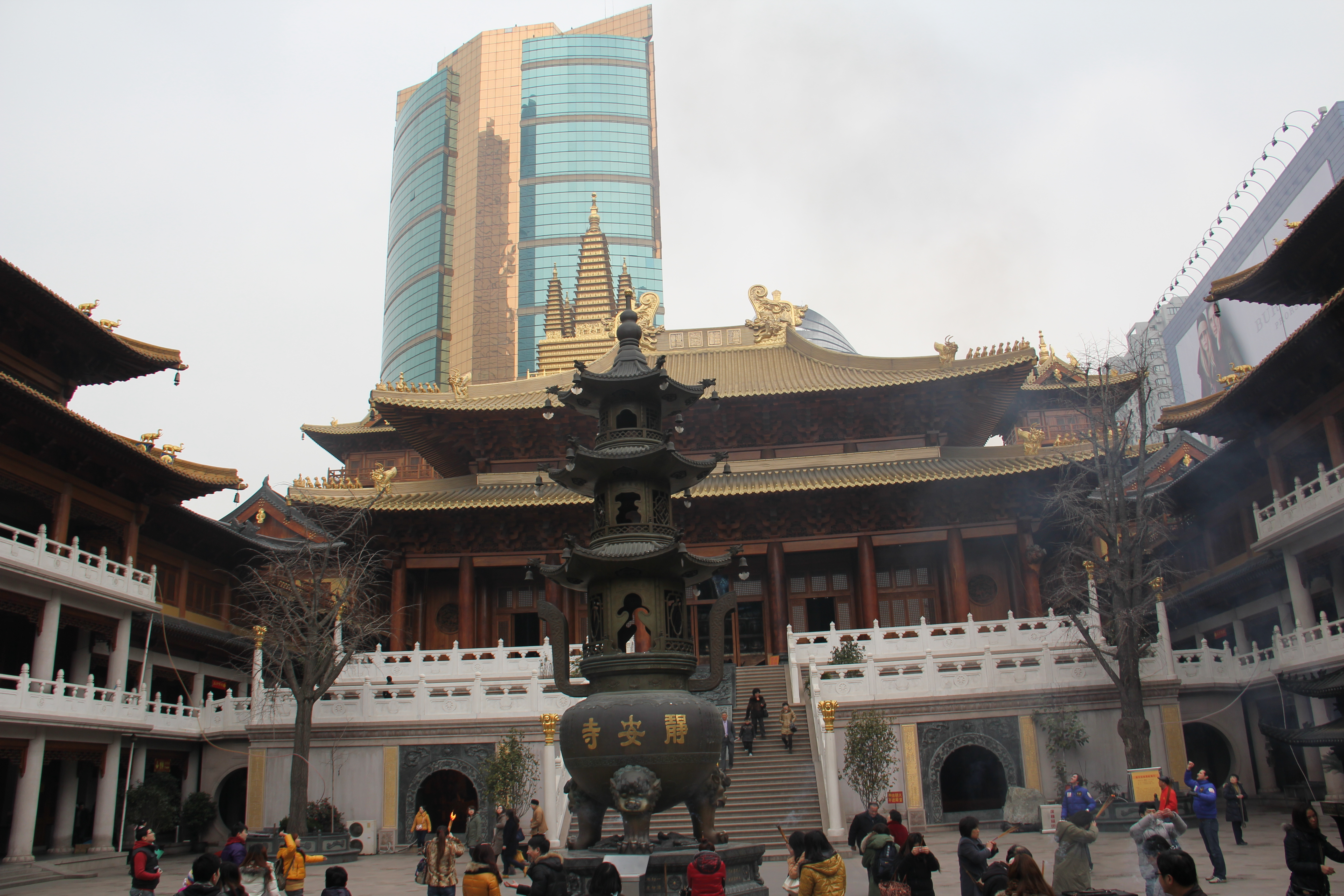 Shanghai Jing'an Tempel